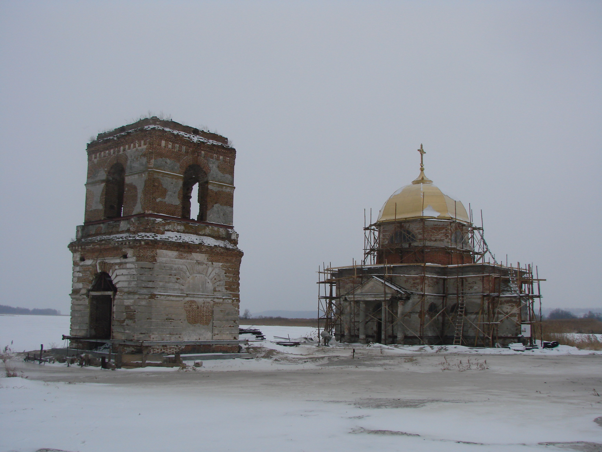 Преображенська церква